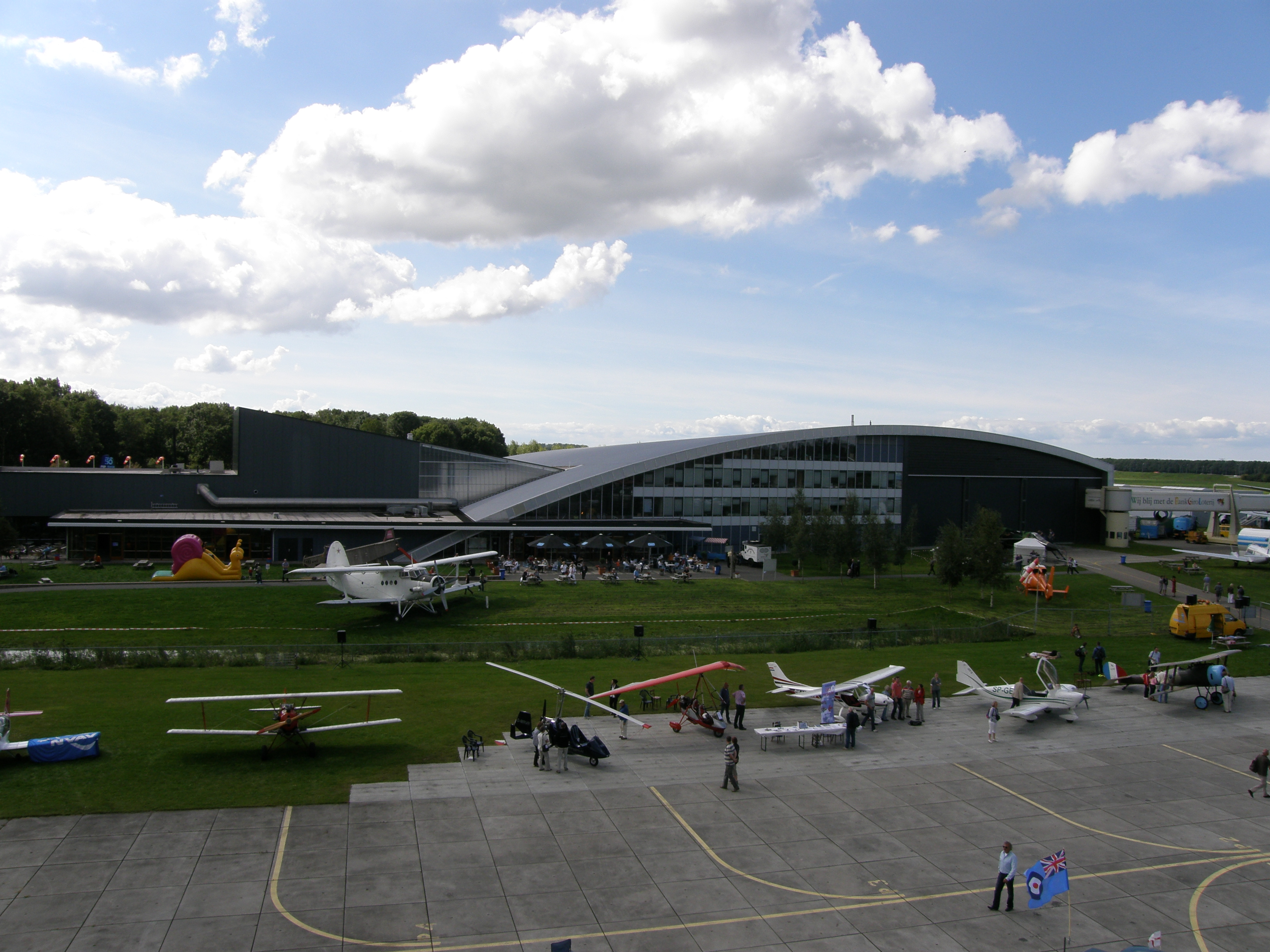 Flughafen Lelystad, Museum Aviodrome.